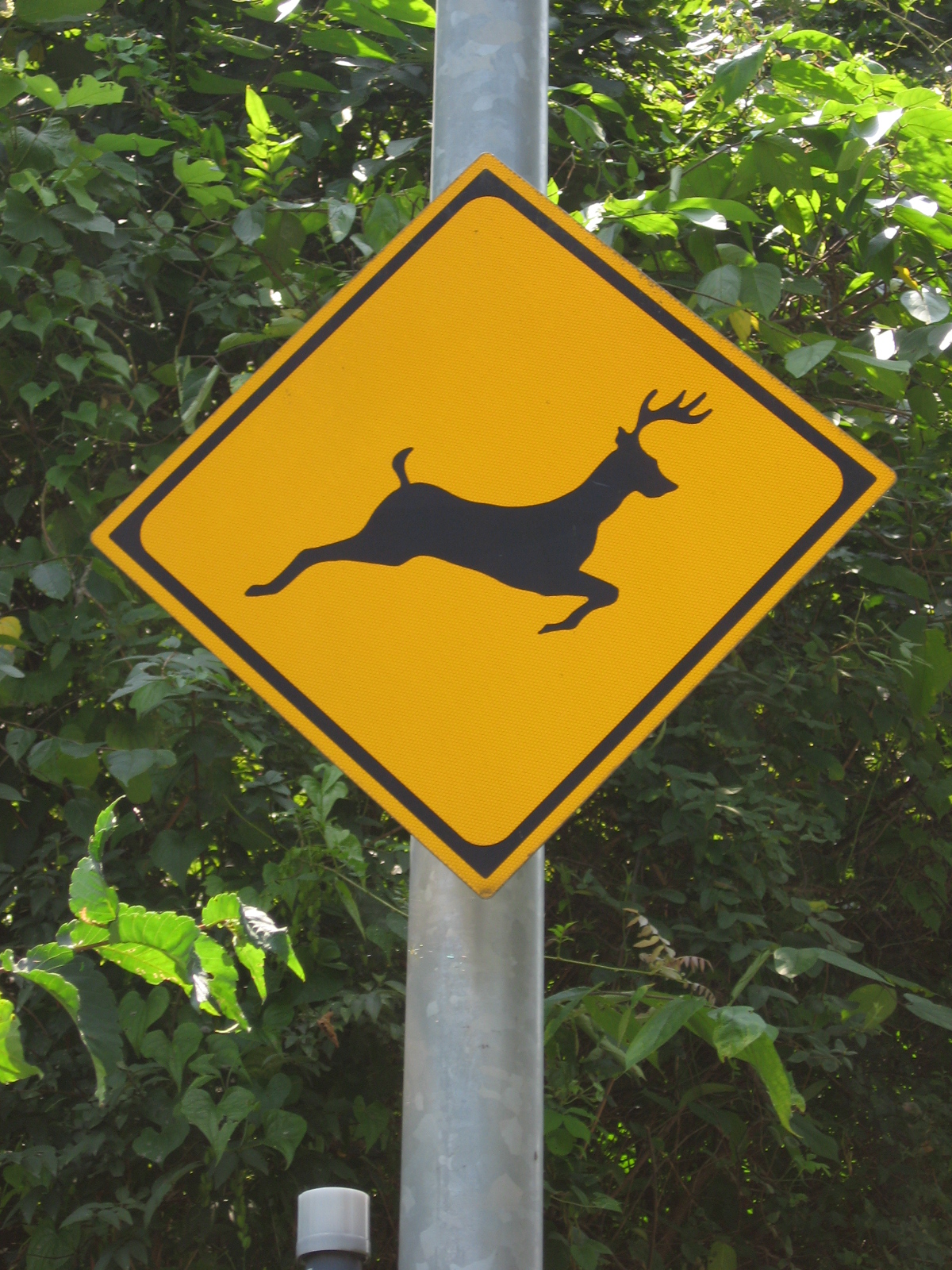 動物注意の道路標識（神奈川県相模原市にて撮影）